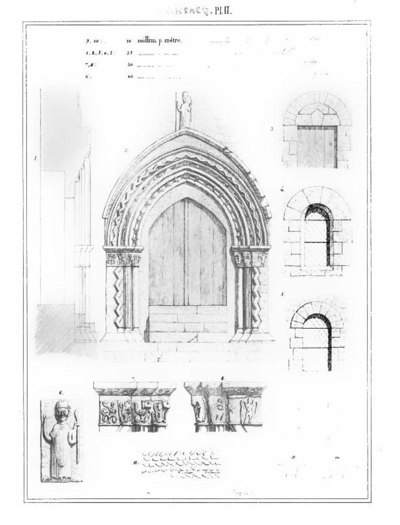 Croquis d'architecture relevés sur place par Eugène Woillez.